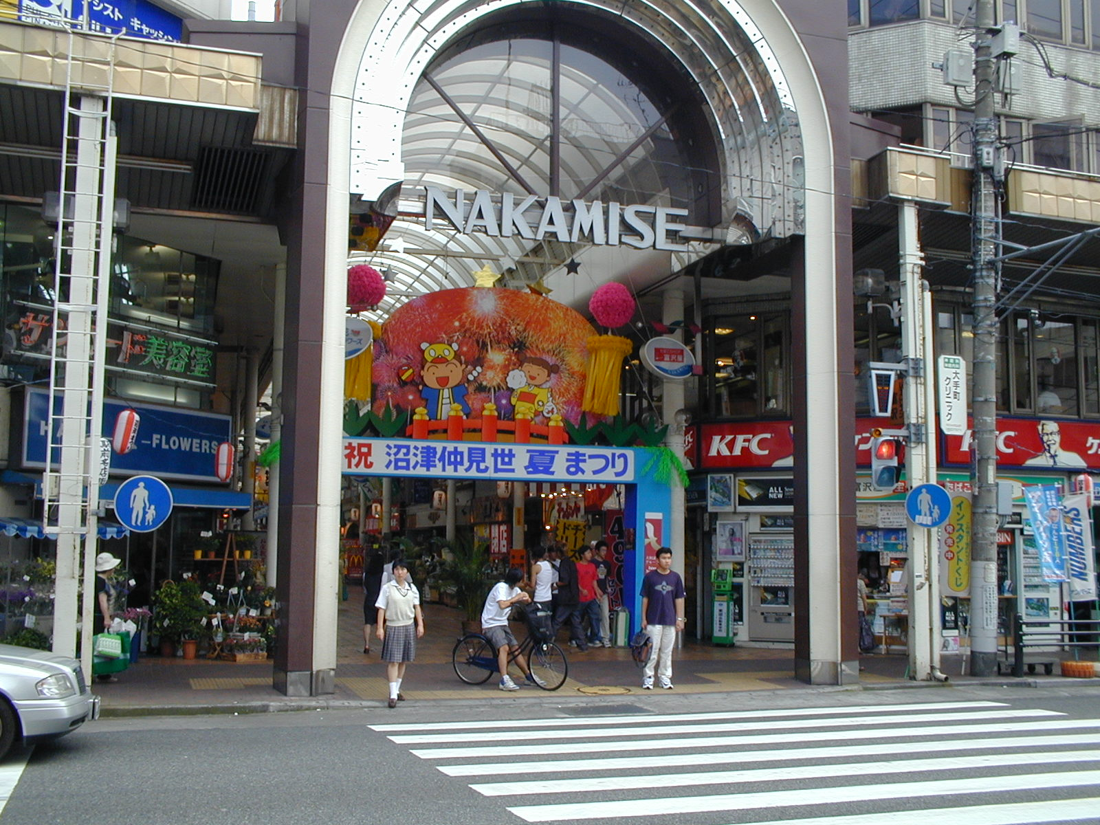 NAKAMISE